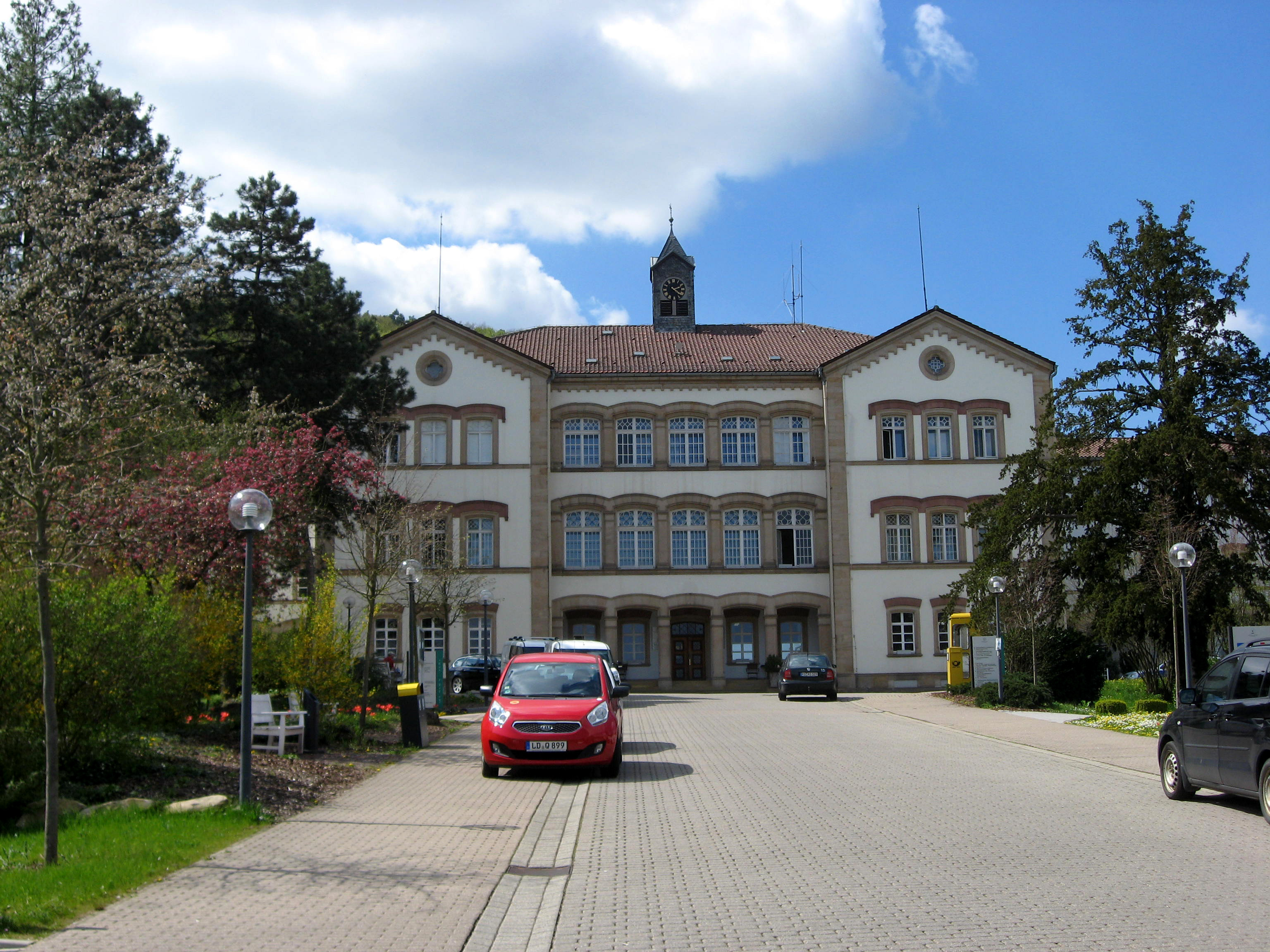 Mittelbau der 1857 als Kreisirrenanstalt errichteten Pfalzklinik Landeck bei Klingenmünster